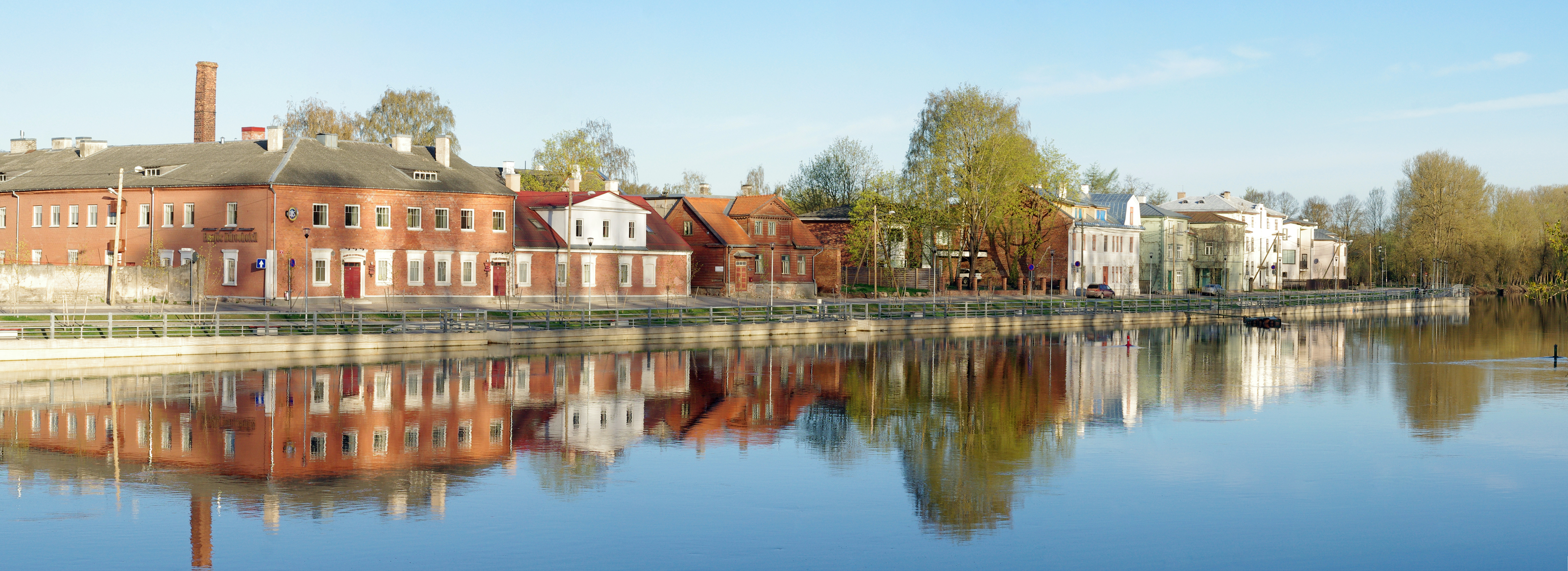 Emajõe tänav Tartus 6. mail 2012